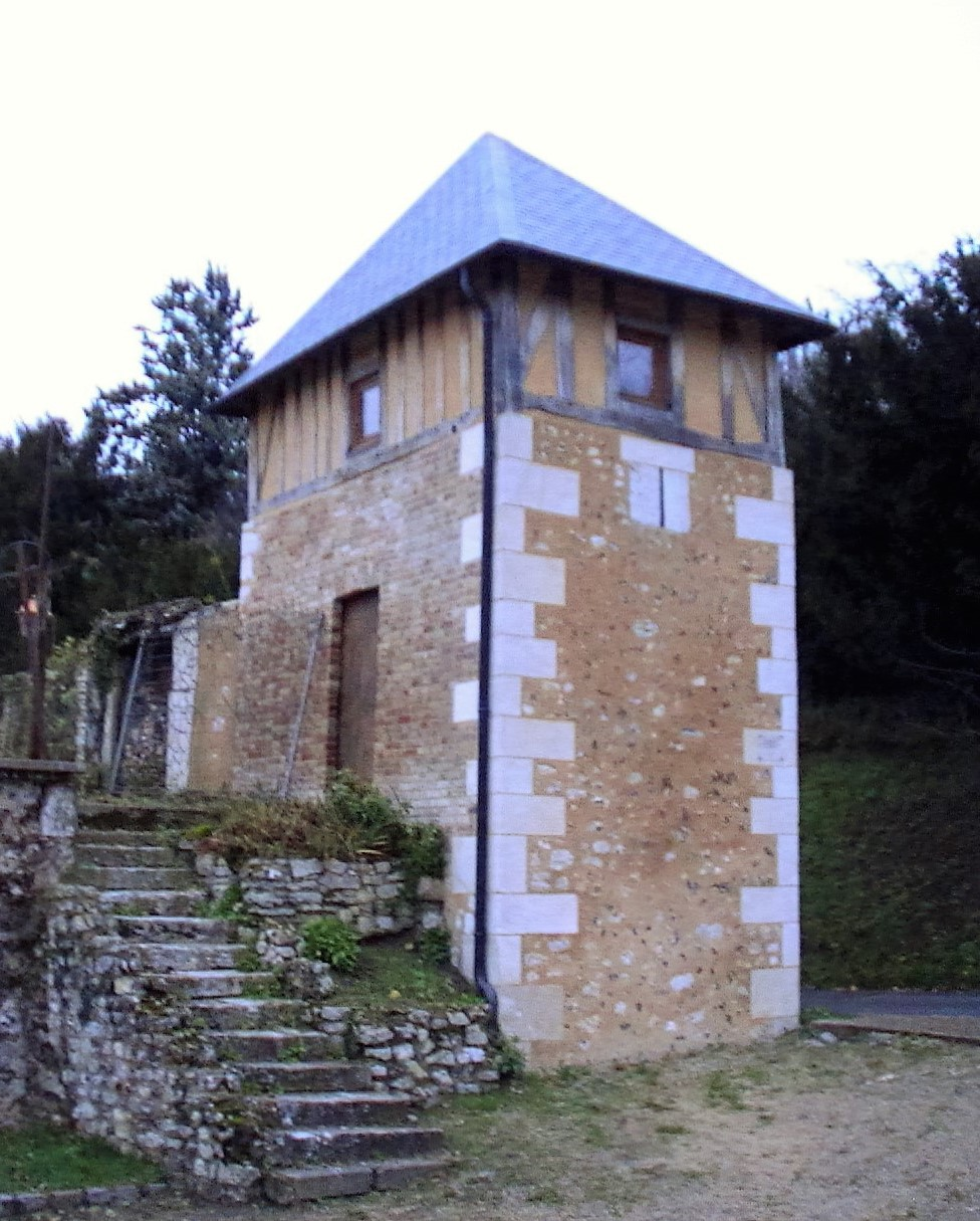 Tour des Andelys - quartier du Petit-Andely - voisinage enceinte médiévale.